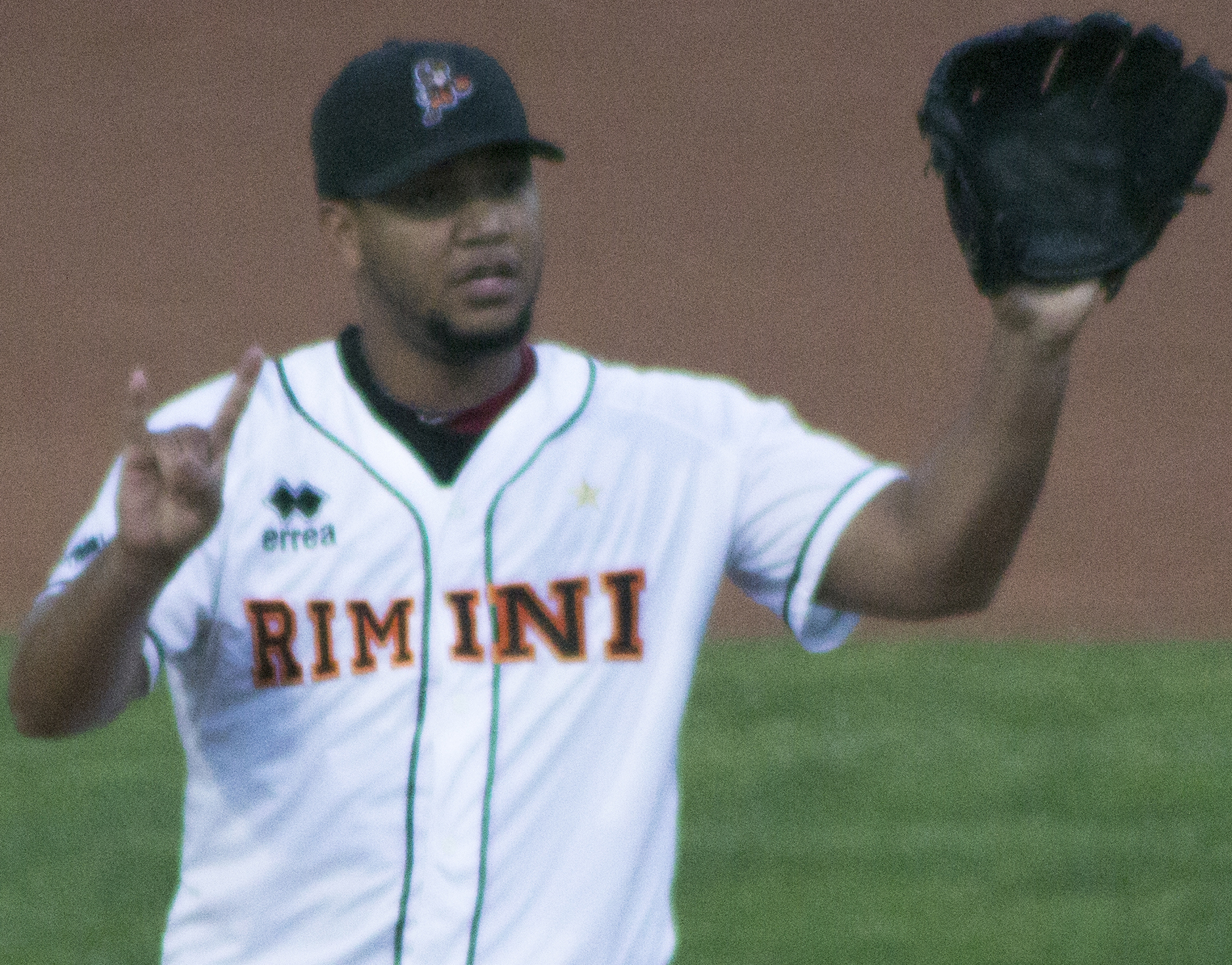 Yorman Bazardo durante San Marino-Rimini, gara valida per l'Italian Baseball League 2013. Foto scattata da me dagli spalti con obiettivo 70-300.